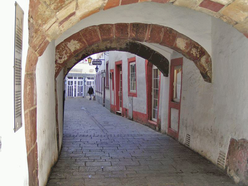 Judengasse in Trier